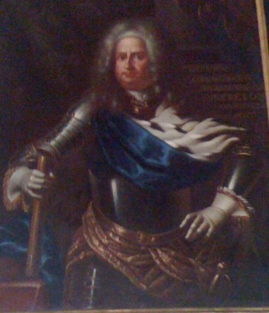 Bartolomeo Corsini, vice-roi de Sicile